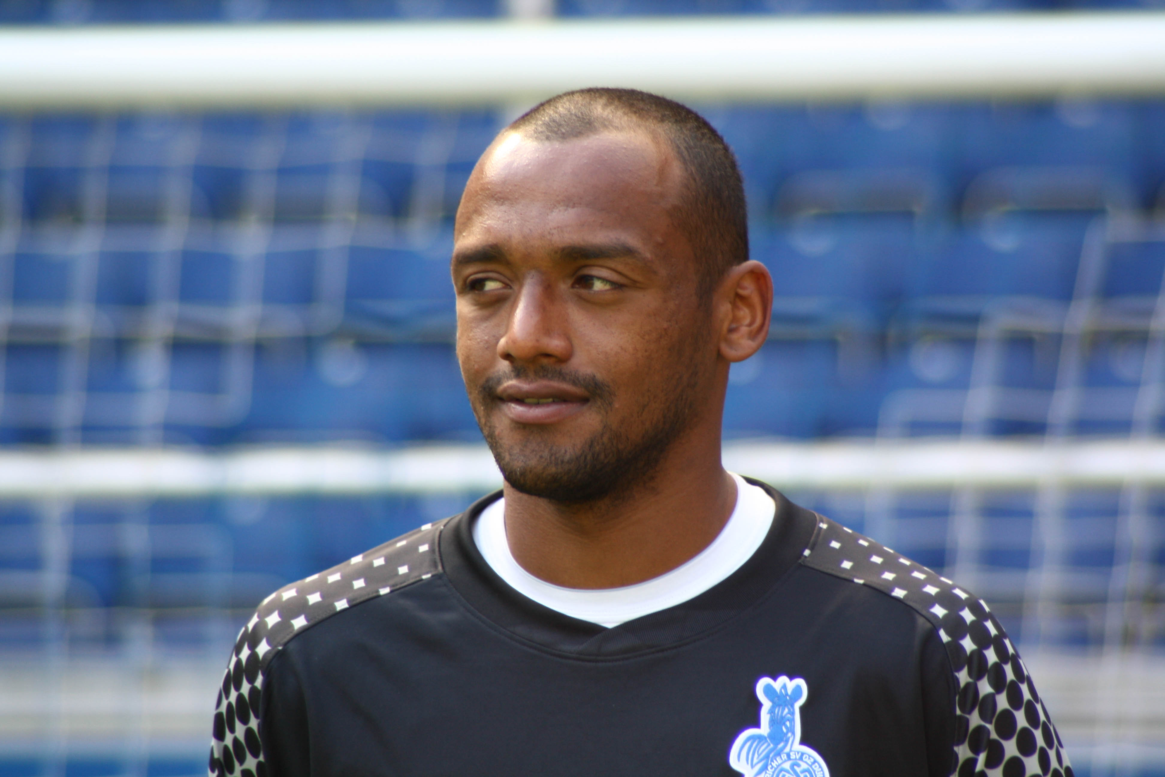 David Yelldell, MSV Duisburg